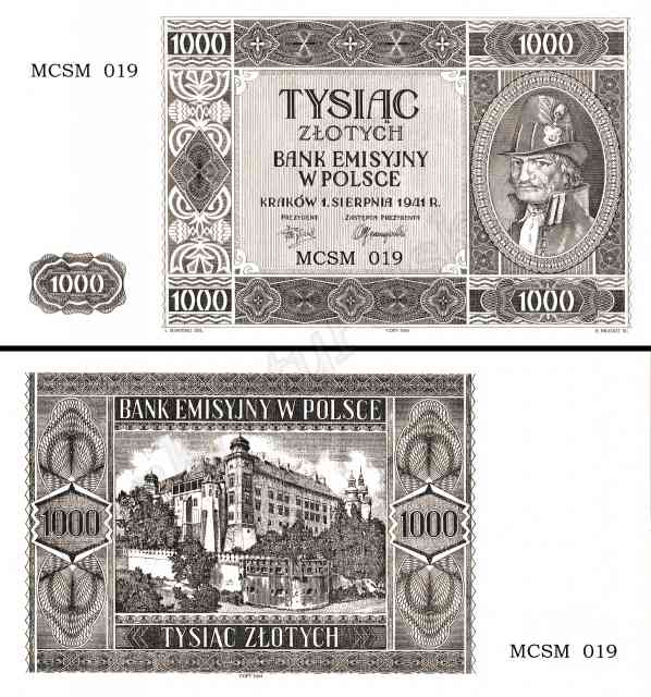 Banknot 1000zl 1941